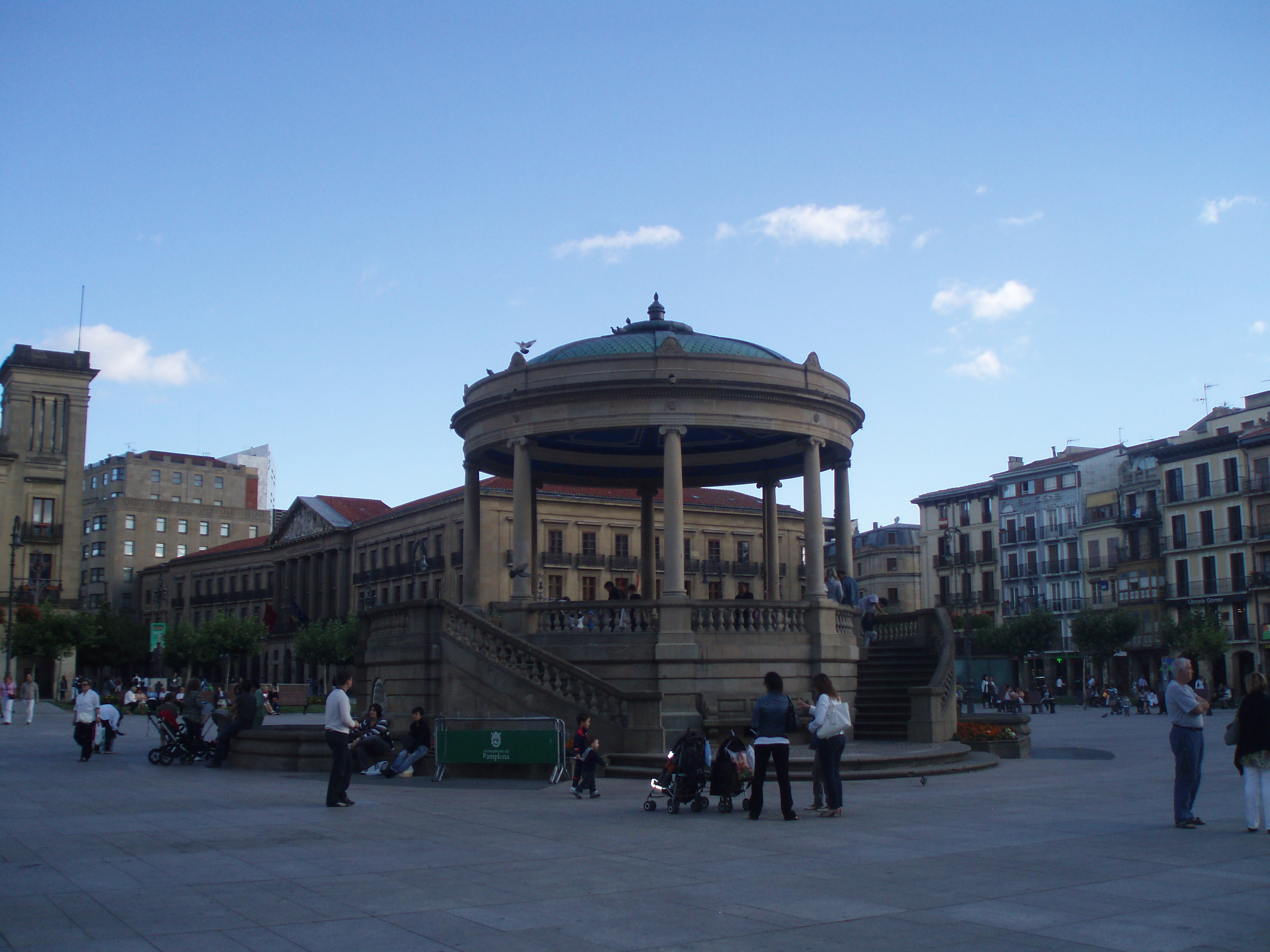 Plaza del castillo en la ciudad de Pamplona. Navarra, (España).